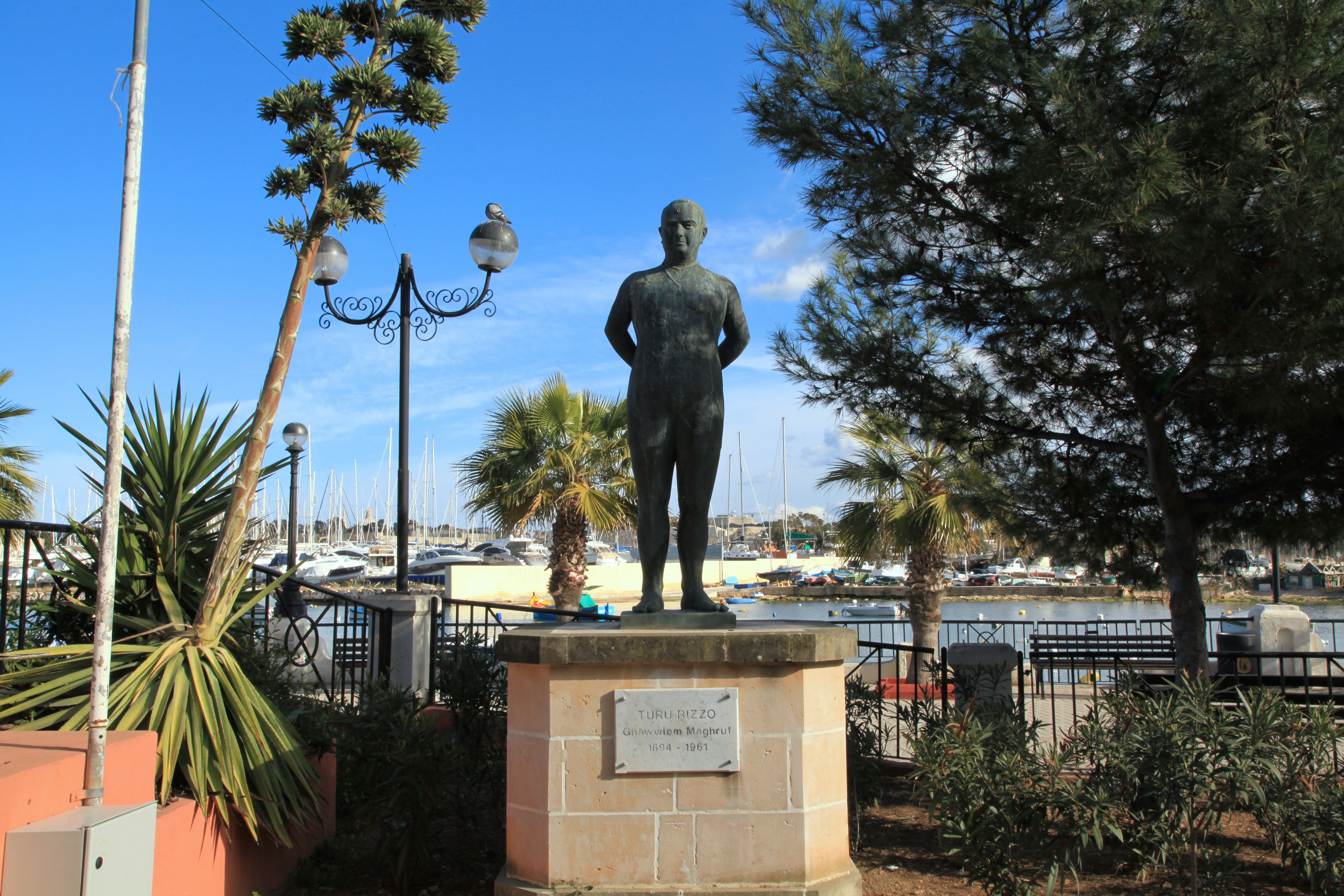 Memorial to Arturo "Turu" Rizzo, Triq Ix-Xatt ("The Strand") in Gżira, Malta